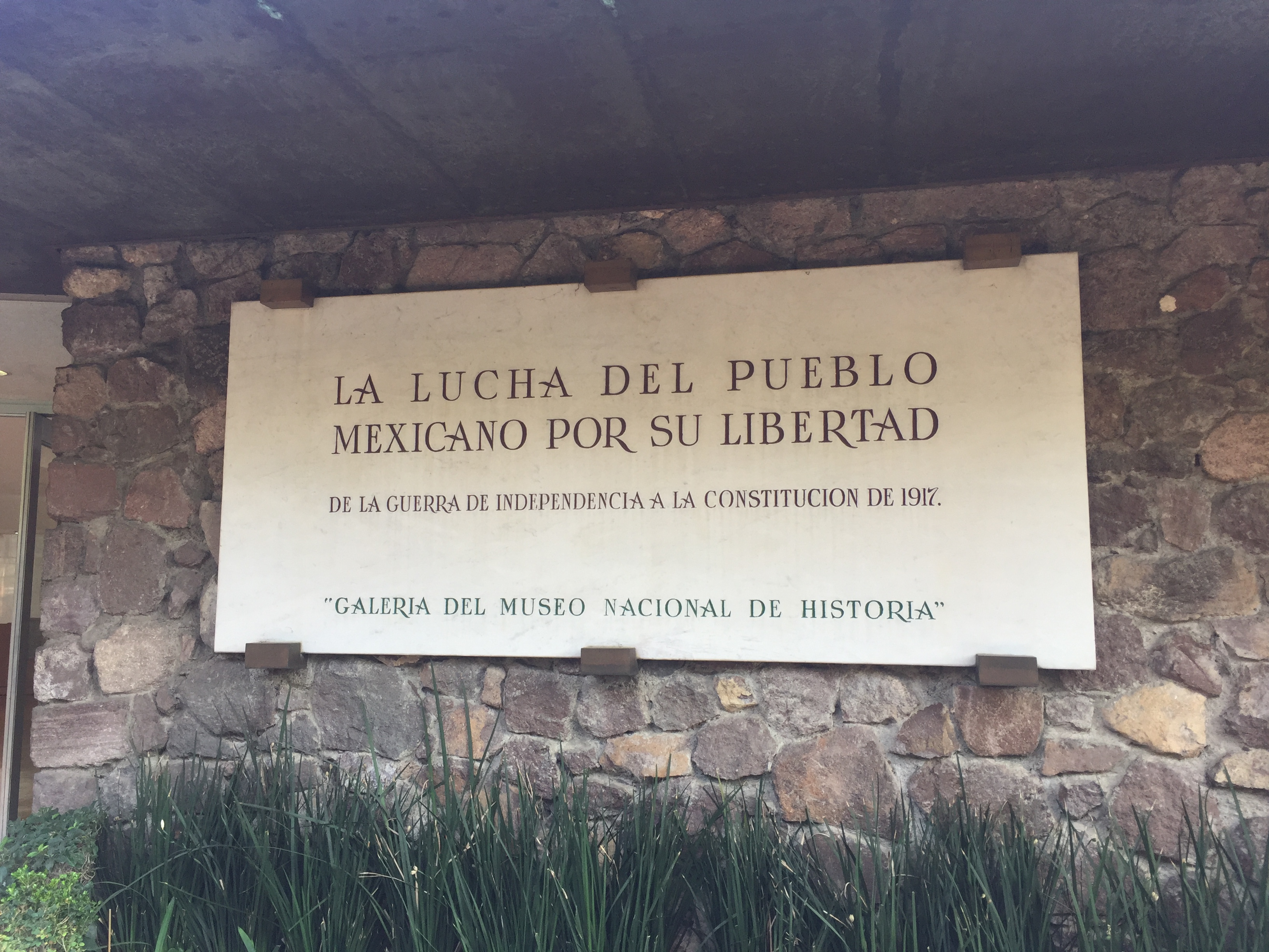 Tema principal del Museo del Caracol